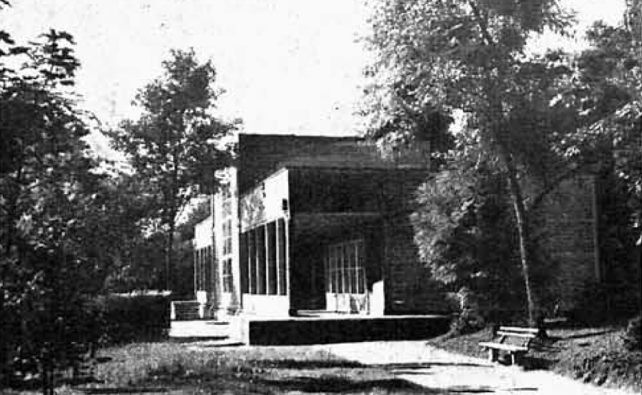 Pijalnia wód mineralnych z 1931 roku w Druskienikach nad Niemnem